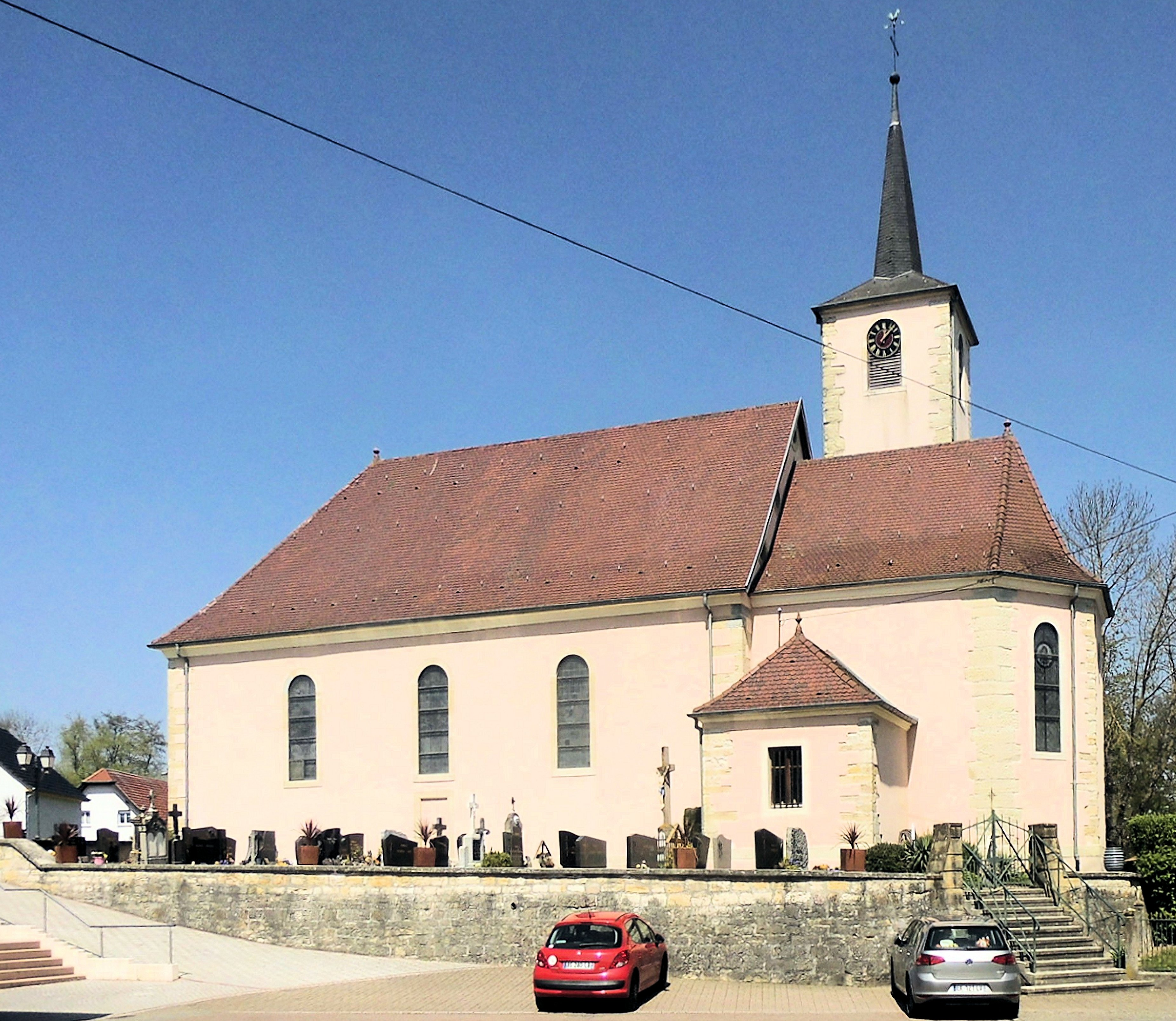 L'église Saint-Imier à Berentzwiller